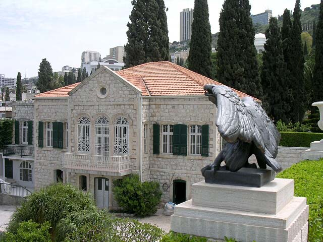 Eastern Pilgrim House